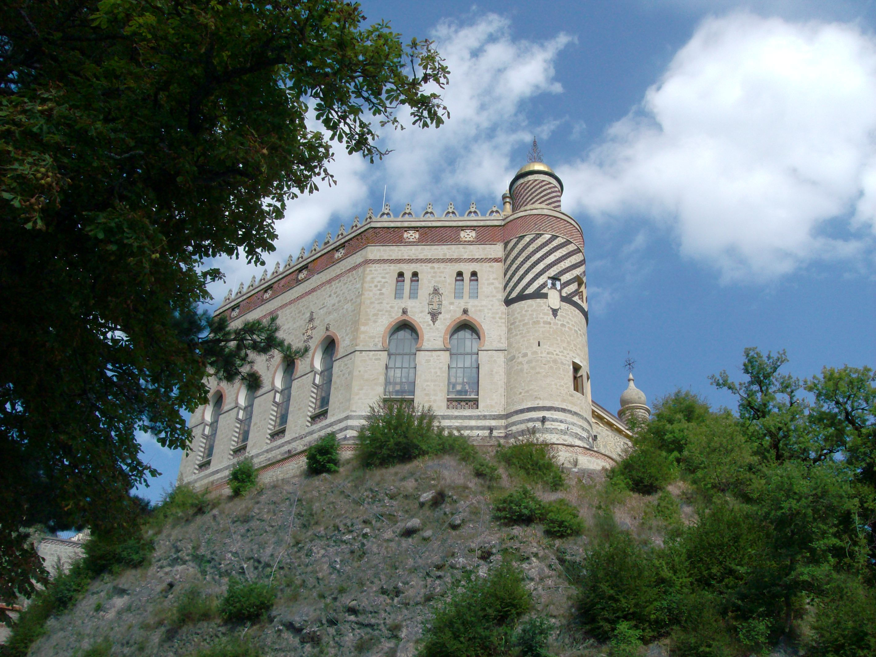 Rocchetta Mattei